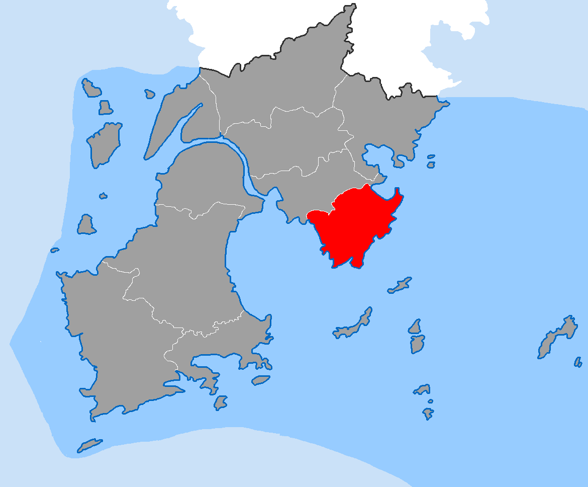 中文（中国大陆）: 干江镇在玉环市的位置